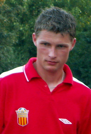 Grzegorz Bonin - Korona Kielce player